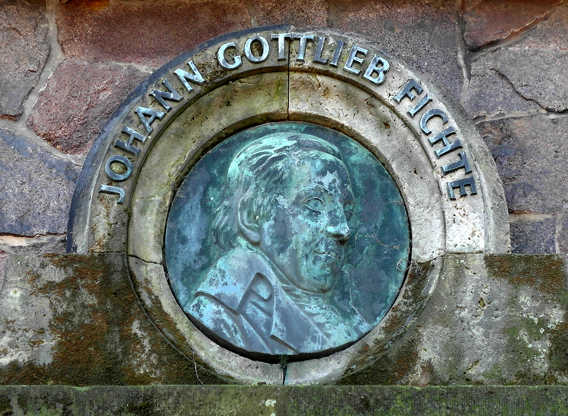 15.01.2018 01187 Dresden-Plauen, Westendring: Fichteturm (GMP: 51.022503,13.712288). Am 26.09.1891 wurde der von Carl Hampel gestaltete Westendpark eröffnet. Im Jahre 1896 wurde der 25 m hohe Bismarck-Turm mit Sandstein und Syenodiorit (Monozit) aus dem Plauenschen Grund errichtet und eröffnet. Nachdem der Park 1937, zum 175. Geburtstag des Philosophen Johann Gottlieb Fichte, in Fichtepark umbenannt worden war, folgte 1954 die Umbenennung des Aussichtspunkts in Fichteturm. Portrait-Medaillon auf der Nordseite üner dem Eingang. [SAM3619.JPG]20180116110DR.JPG(c)Blobelt